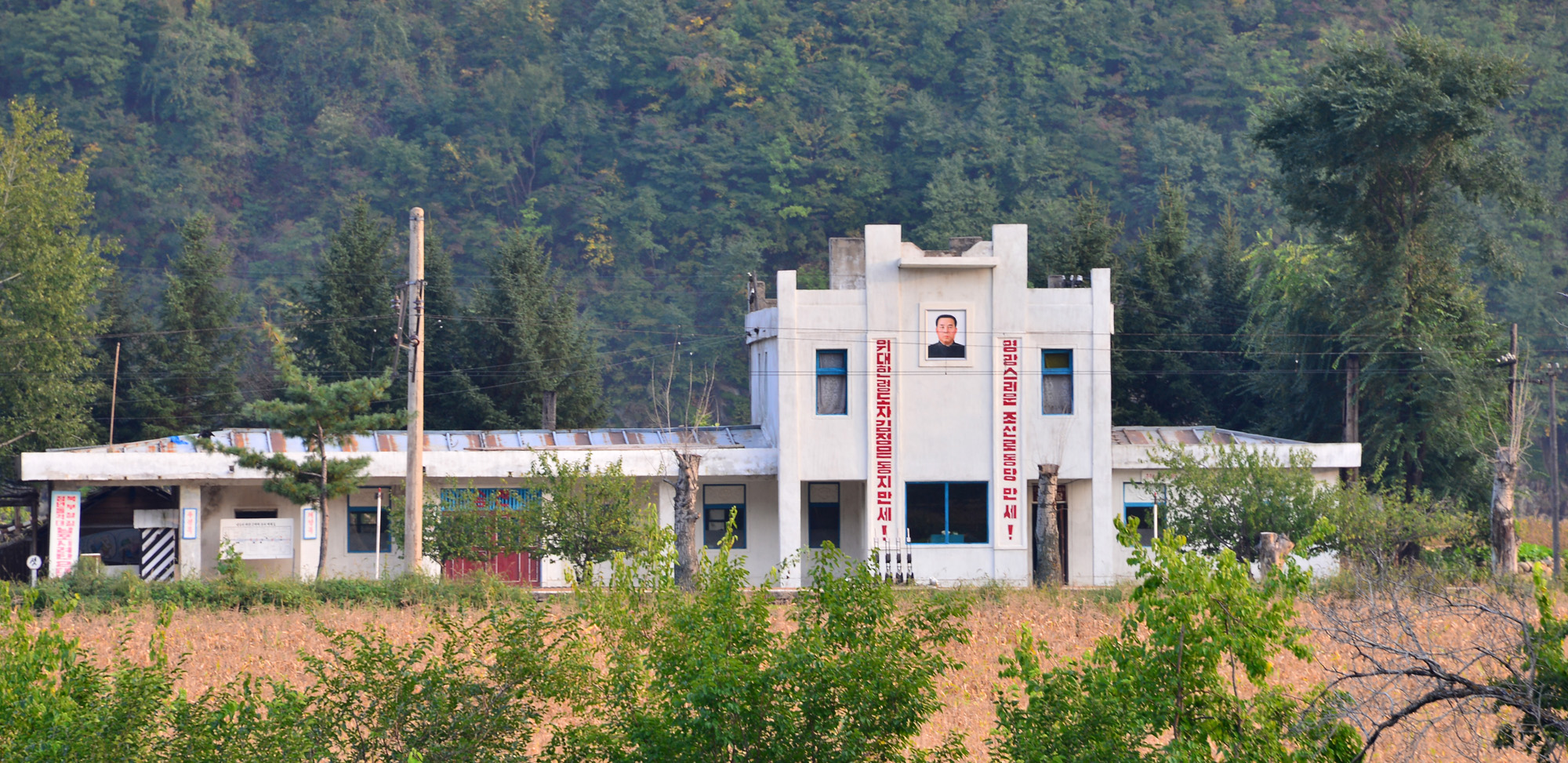 两江道松田站